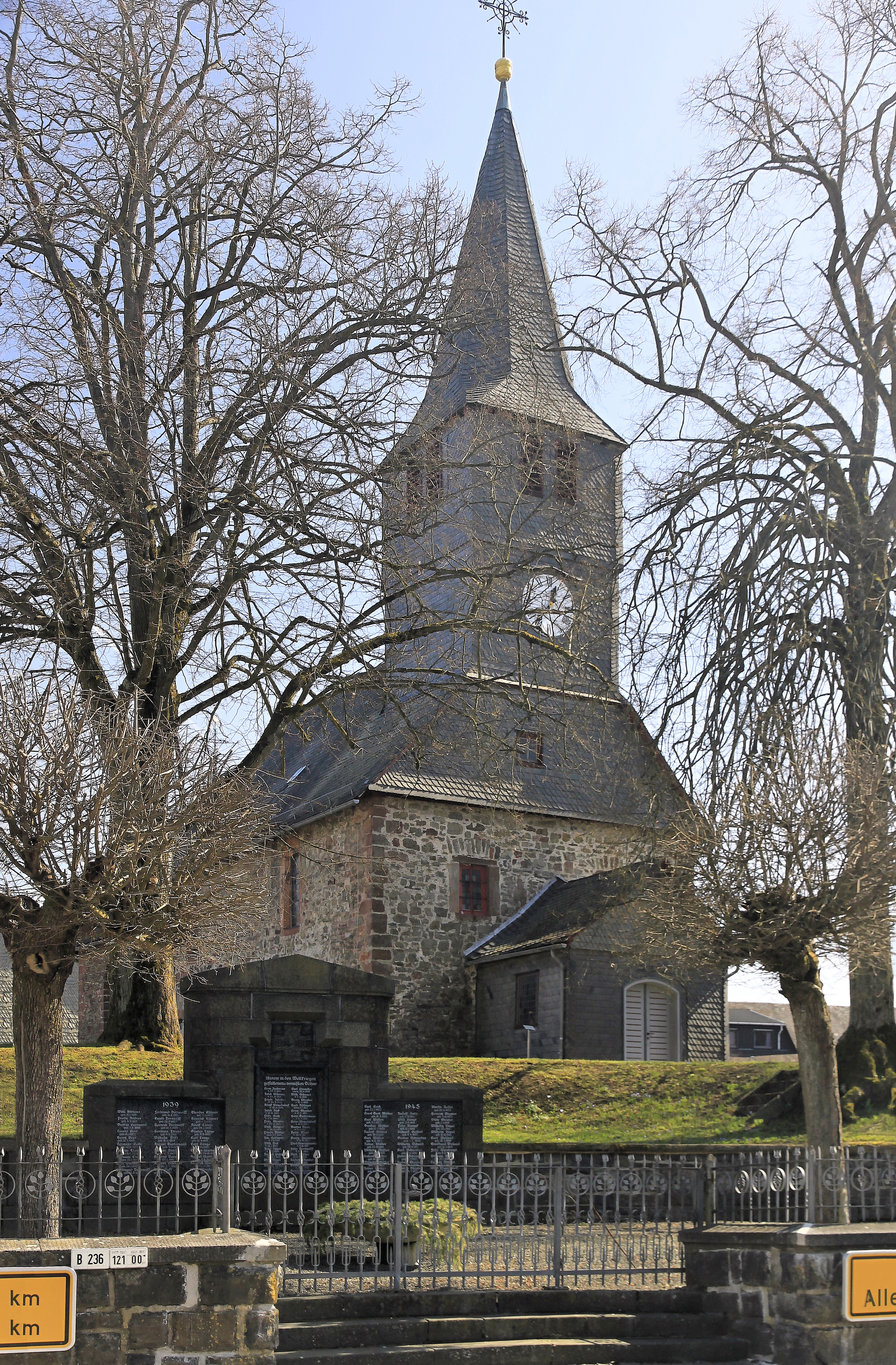 Evangelische Kirche Bromskirchen (Hessen, Deutschland)